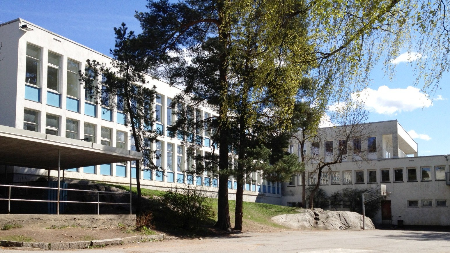 Munkerud skole, Oslo